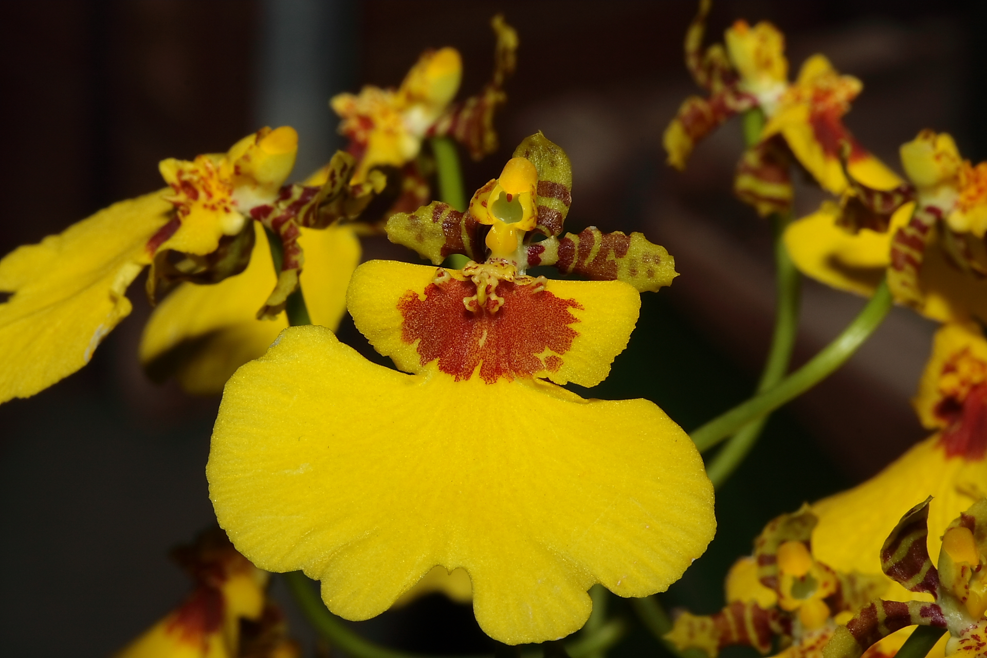 Oncidium varicosum Orchid